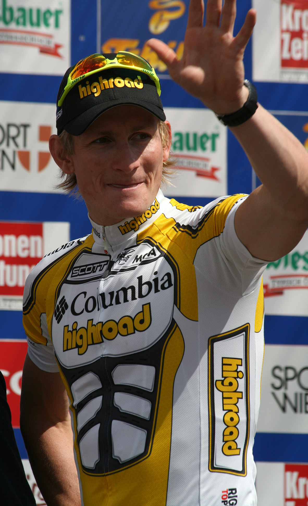 André Greipel, Sieger der Punktewertung der Österreich-Rundfahrt 2009